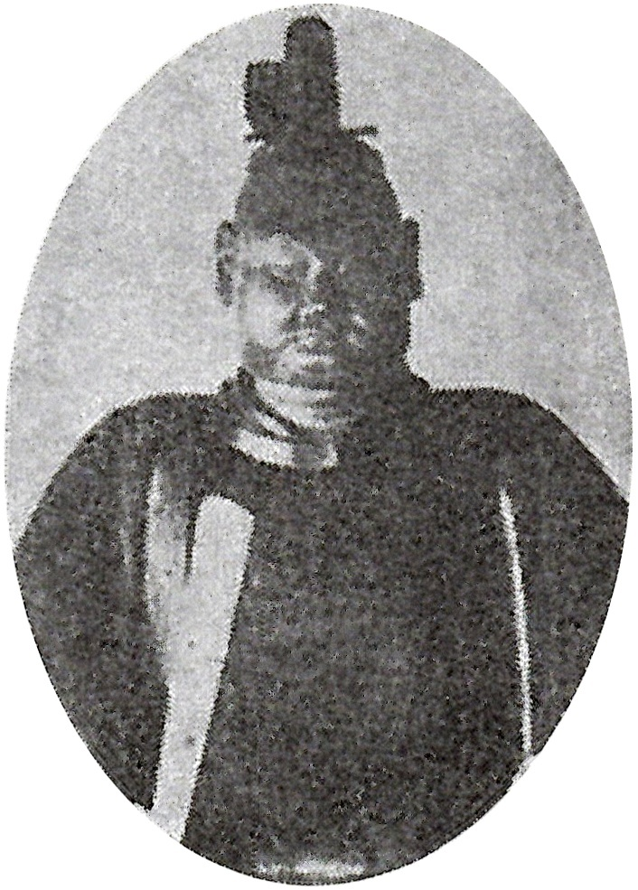 徳川斉朝の木像の写真(長栄寺旧蔵、木像は戦禍により焼失。戦前に撮影)。